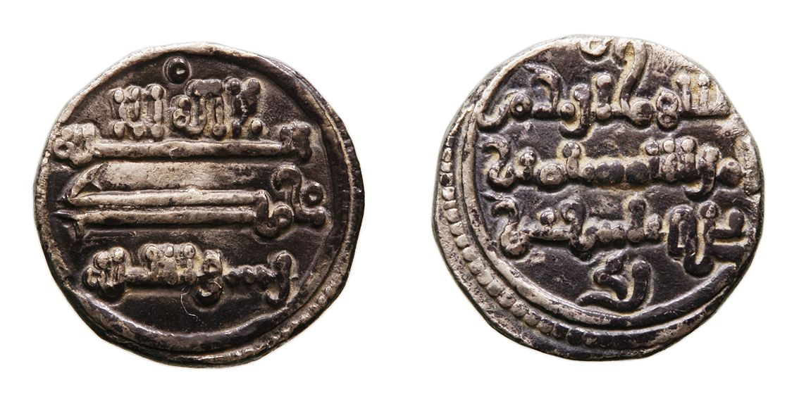 YAHYA ABEN GANIYA. Quirate. AR. (540-543 H.) V.1980. Muy escasa. EBC-/MBC+. Taifas almorávides